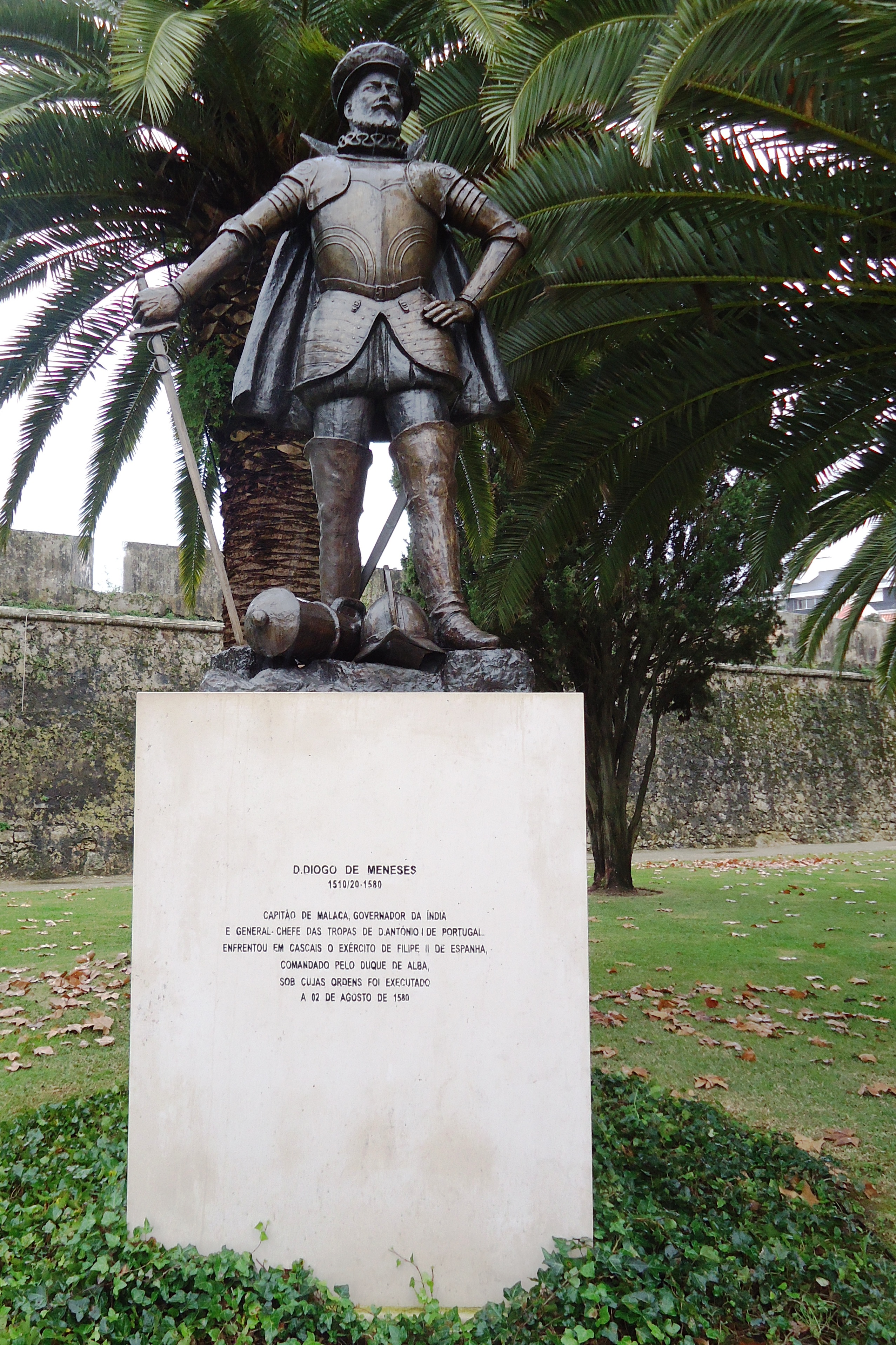 "D. Diogo de Meneses / (1510/20-1580) / Capitão de Malaca, Governador da Índia / e General-Chefe das Tropas de D. António I de Portugal. / Enfrentou em Cascais o exército de Filipe II de Espanha, / comandado pelo Duque de Alba, / sob cujas ordens foi executado / a 02 de agosto de 1580." Escultura em bronze de autoria de Augusto Gil, inaugurada em 17 de abril de 2010.